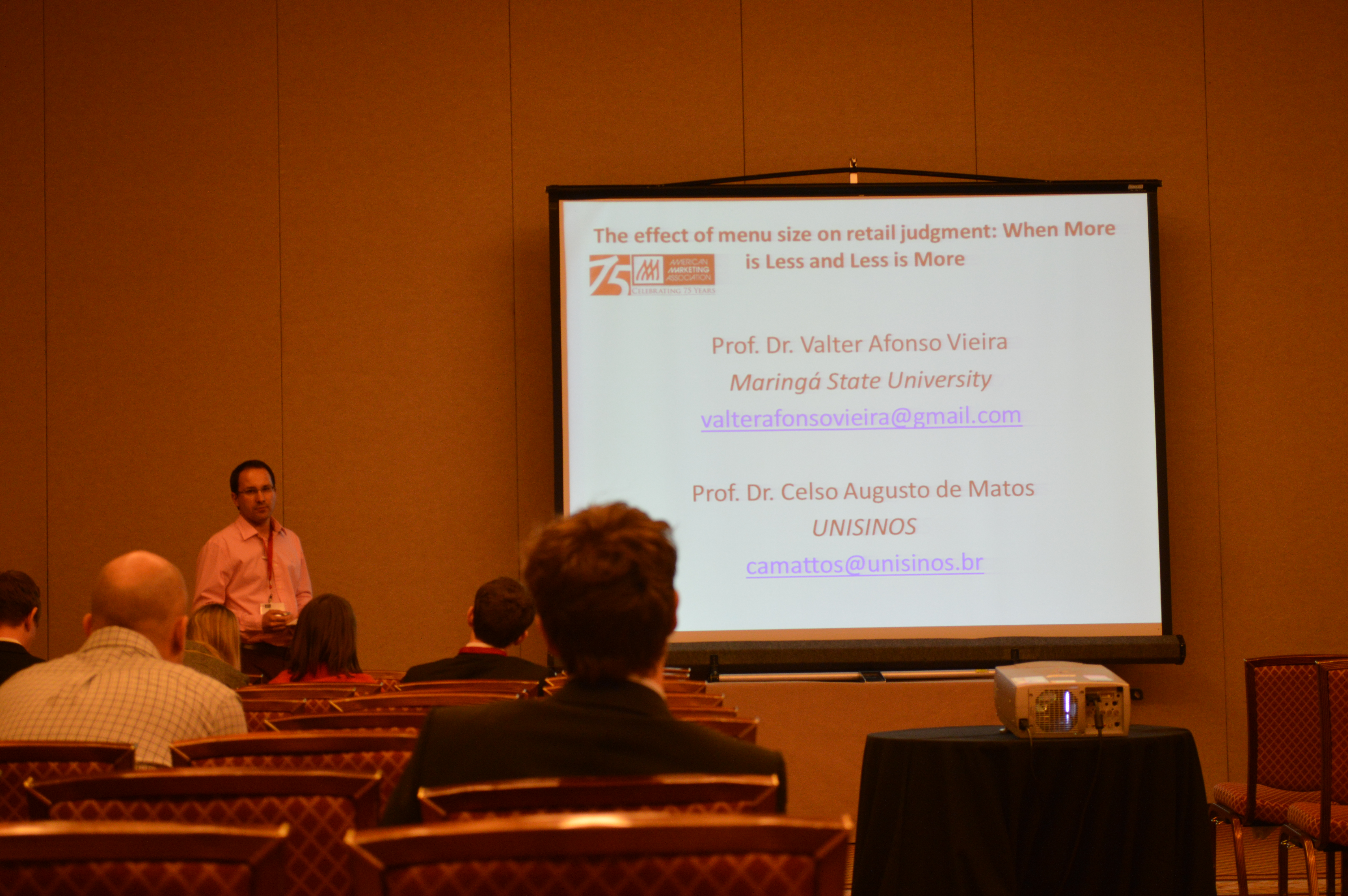 Apresentação AMA Winter Conference, Las Vegas, Nevada, USA.